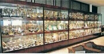 النادي الأهلي السعودي أحد أعرق وأشهر الاندية السعودية والآسيوية والعربية ويوجد مقره بمدينة جدة غرب السعودية. تأسس في عام 1937 م. وحقق في جميع الألعاب أكثر من 1000 بطولة فيما كان نصيب الفريق الأول لكرة القدم منها 48 بطولة موثقة ورسمية. وكان أول فريق يحقق الدوري السعودي كما أنه ايضاً جمع كأس الملك والدوري في موسم واحد , يلقب في البطولات العربية بأهلي جدة تفريقا بينه وبين فرق الأهلي العربية العديدة. يسمى من قبل محبيه بالراقي كما أطلق عليه الأمير سلطان بن فهد بن عبد العزيز آل سعود الرئيس السابق للاتحاد السعودي لكرة القدم. وكذلك يلقب بـ (قلعة الكؤوس). ألوان النادي هي الأخضر والأبيض. يلقب في البطولات العربية بأهلي جدة تفريقا بينه وبين فرق الأهلي العربية العديدة ويلقب أيضاً بالنادي الملكي لعدة أسباب أبرزها : تسيّده لبطولة كاس الملك بالاضافة للسيفين والنخلة واللون المطابق للملكة وأيضاً هو النادي الوحيد الذي استلم كؤوس الملوك جميعهم بالاضافة ان الملك عبد الله حفظه الله اطلق لقب للنادي الأهلي بـ سفير الوطن بمرسوم ملكي وتدل هذه الاسباب بالاحقية للنادي الأهلي الملكي .